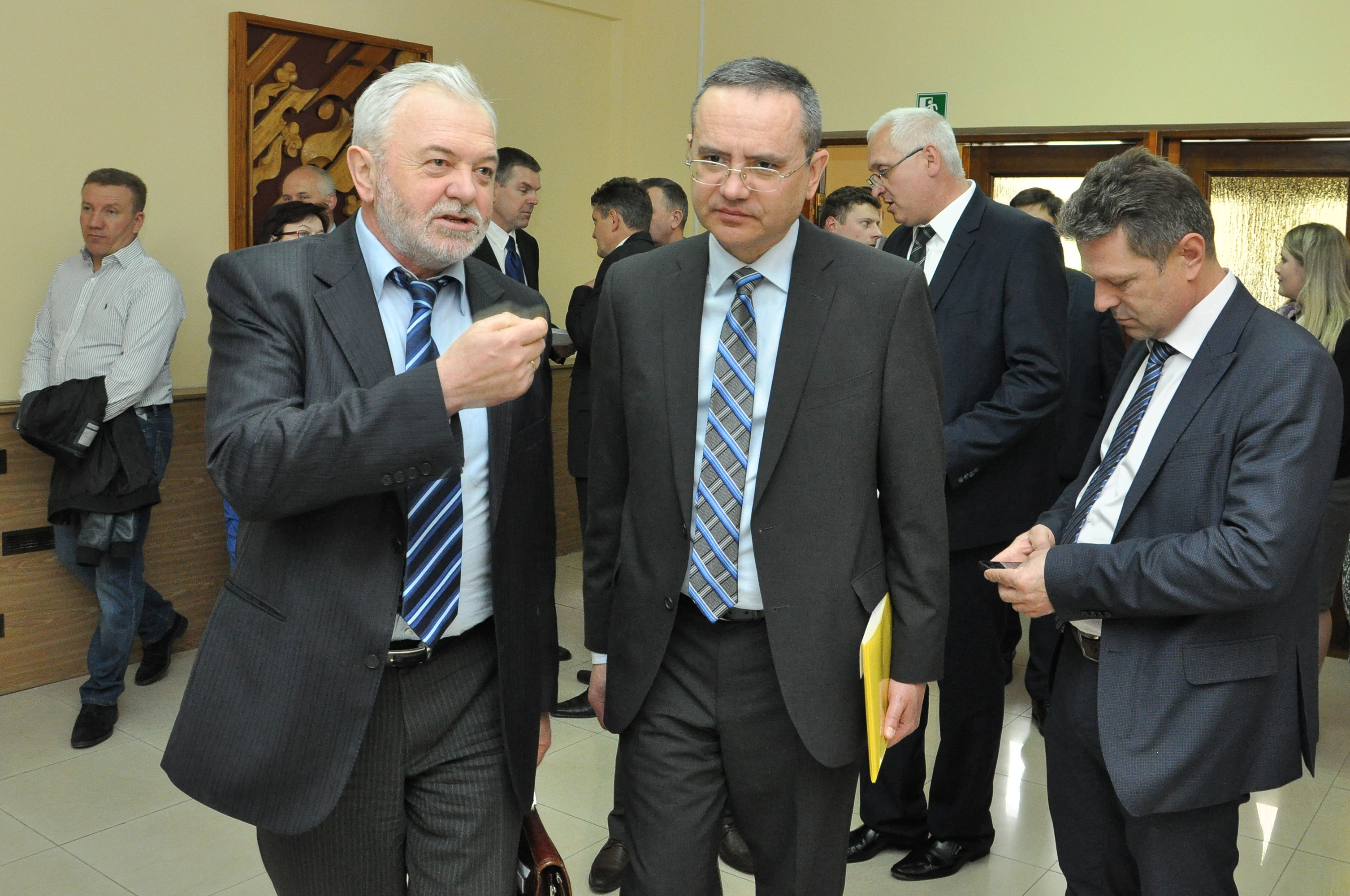 Виїзна колегія МОЗ України в конгрес-центрі НОК «Червона калина» ТДМУ в Теребовлянському районі Тернопільської области 20 травня 2016 року. Міністр охорони здоров'я України у 2007–2010 роках Василь Князевич і ректор ТДМУ Михайло Корда.